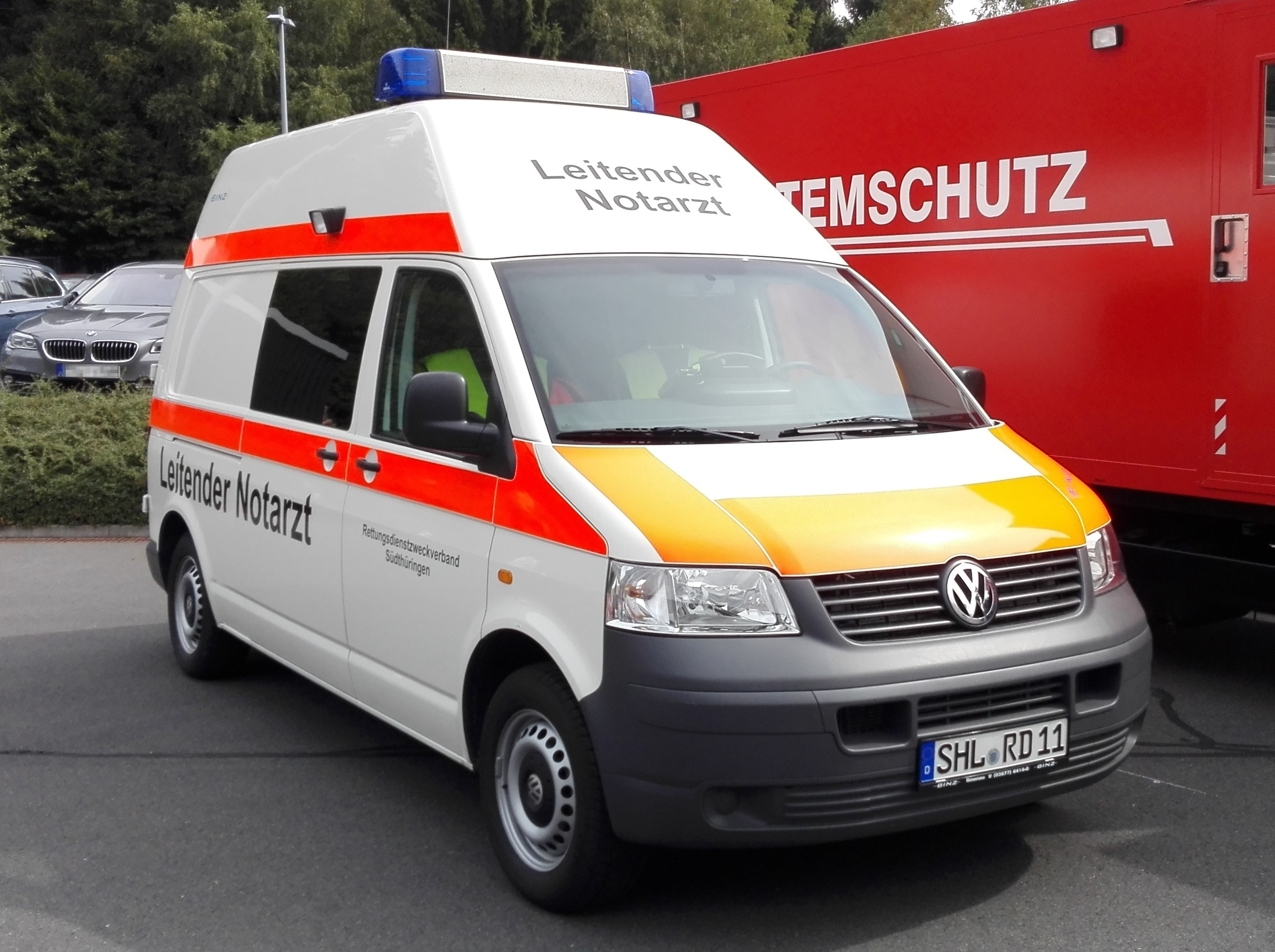 Leitender Notarzt des RDZV Südthüringen